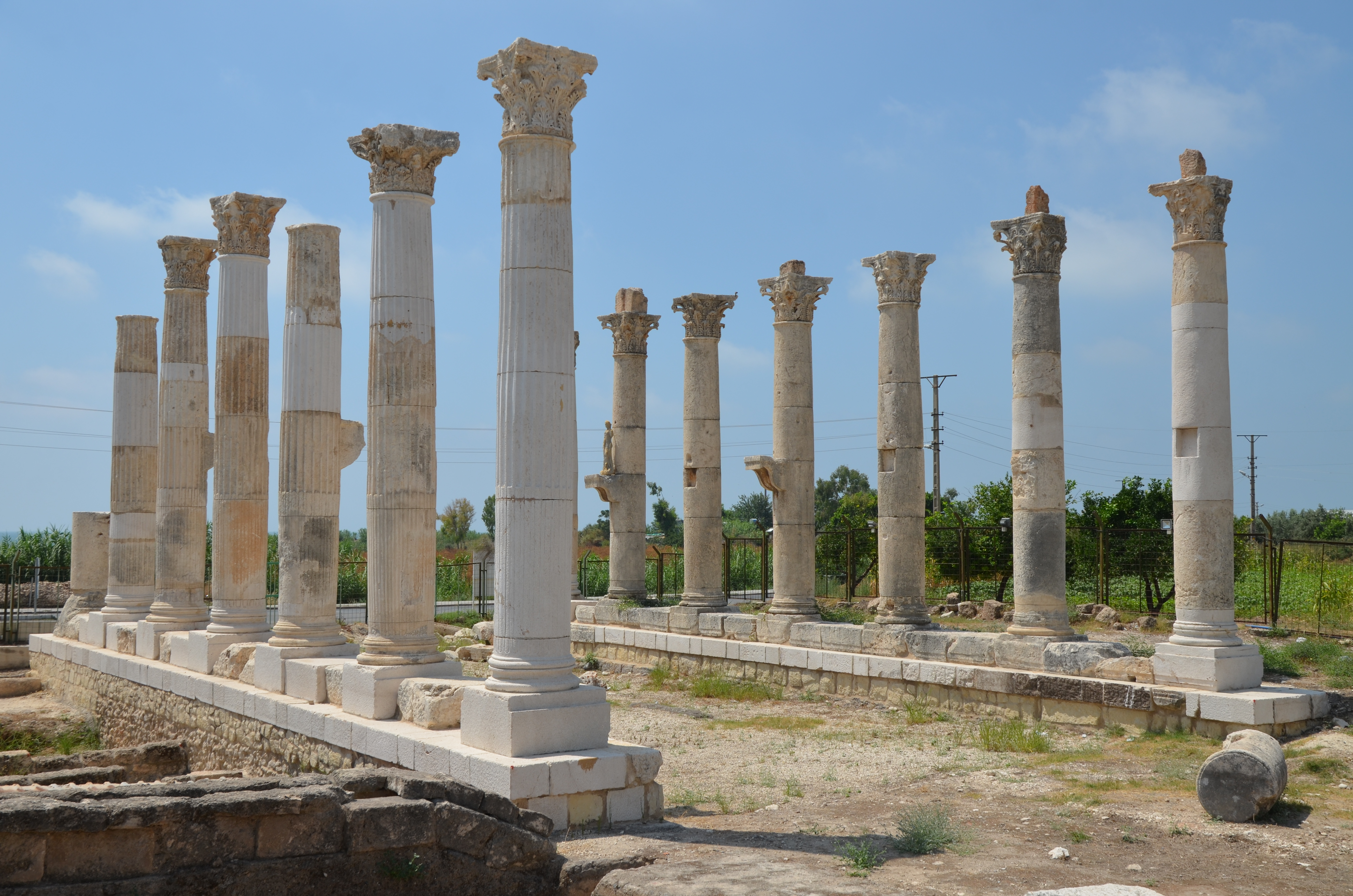 Soli/Pompeipolis, Turkey